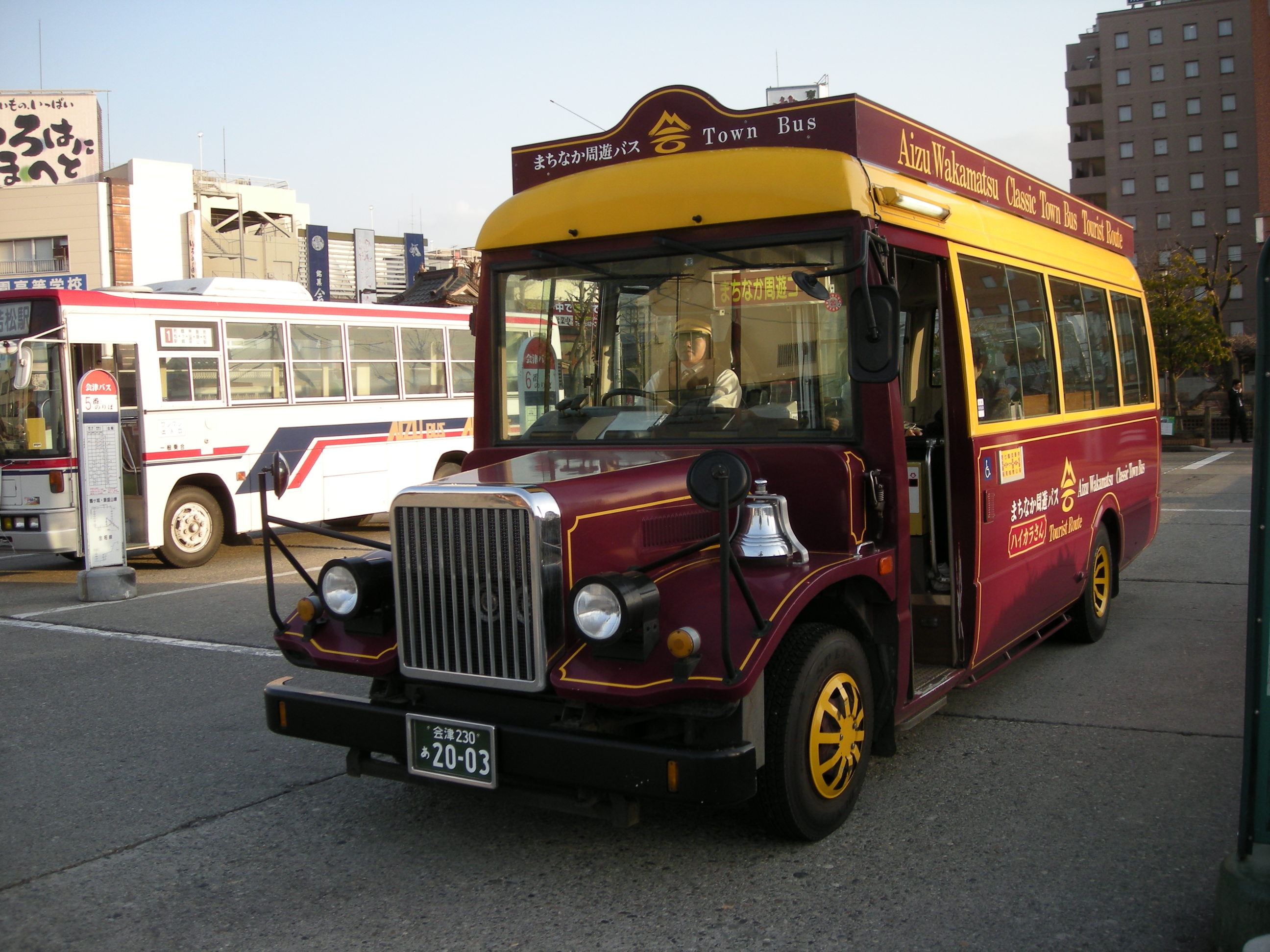 Aizu Wakamatsu Station（会津若松駅）